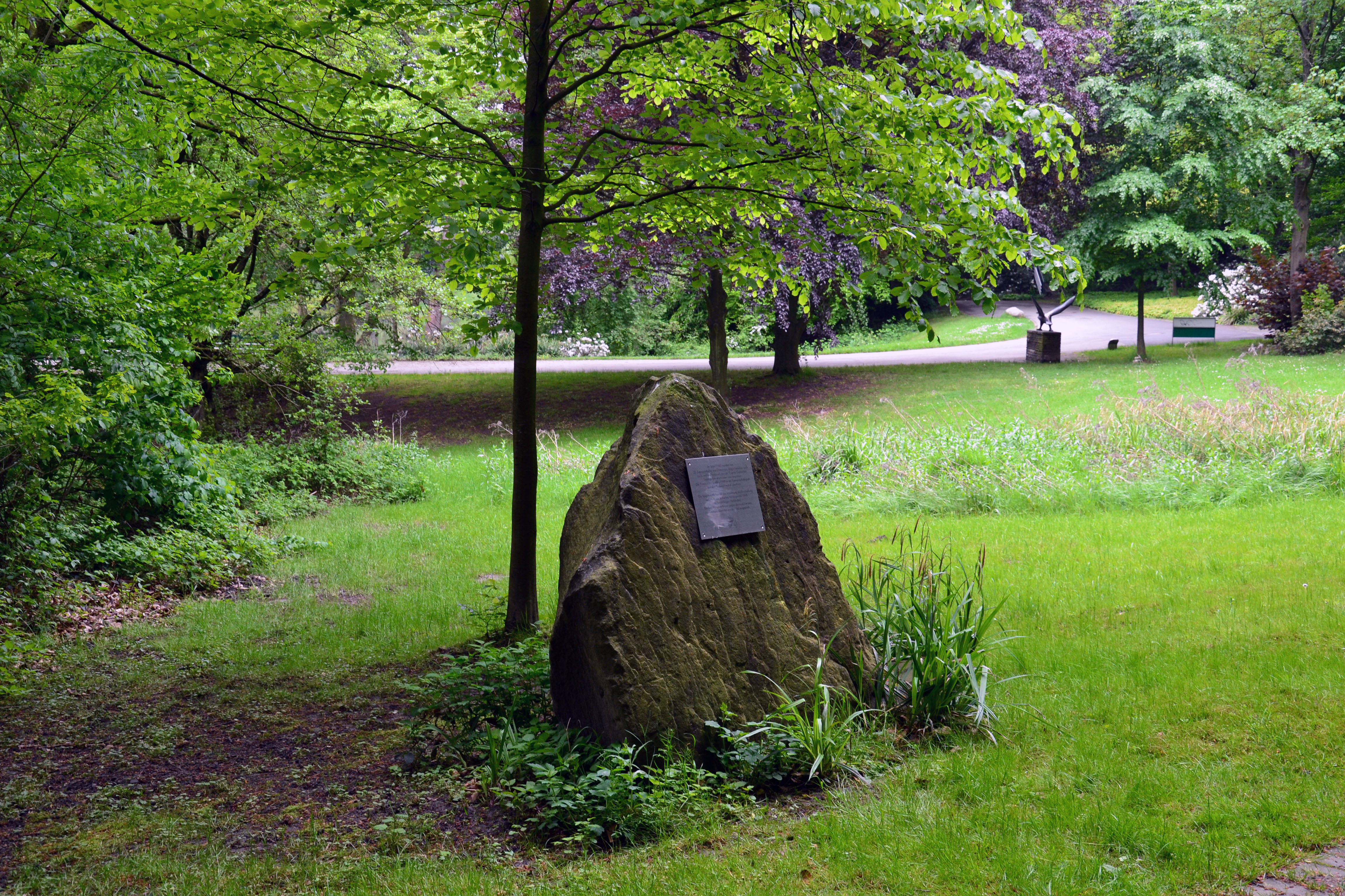 Gedenktafel zum Montagsloch im Grugapark in Essen. Hier wurden 1945 von der Gestapo hingerichtete russische Zwangsarbeiter gefunden.